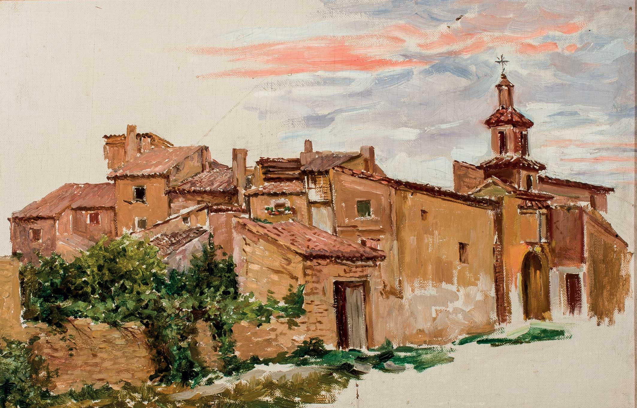 Quinto de Ebro, óleo sobre lienzo, 29 x 44 cm, colección privada (subastado en Durán el 19 de septiembre de 2014)